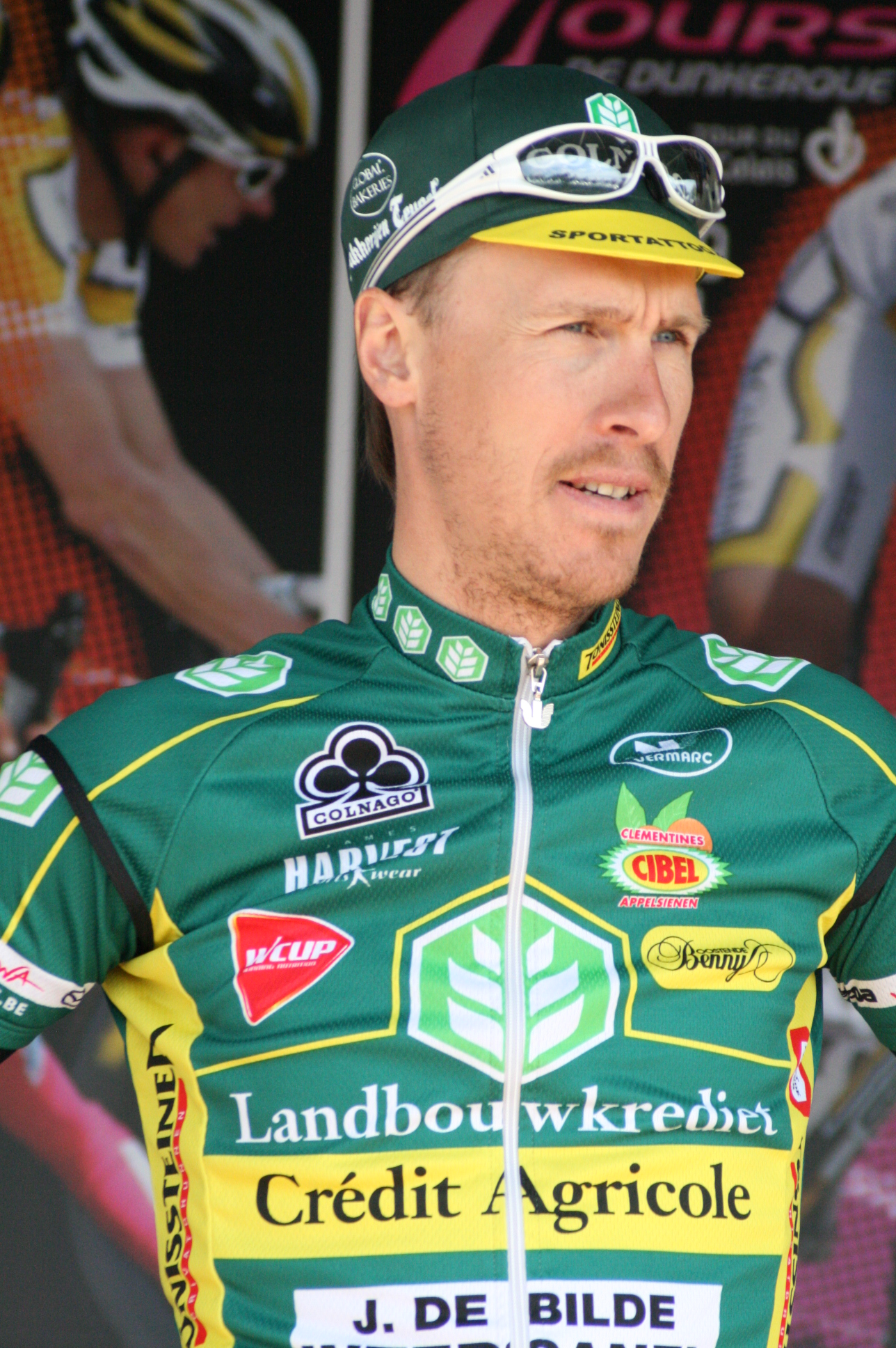 Frédéric Amorison lors de la présentation des équipes des 4 jours de Dunkerque